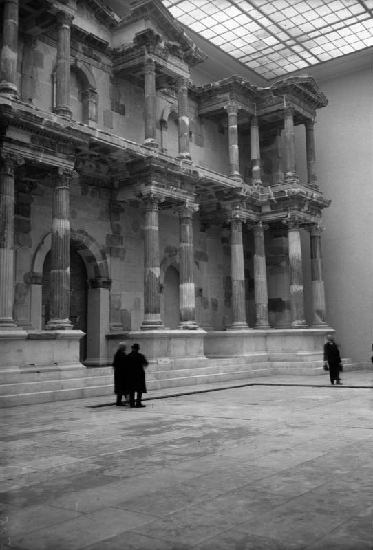 Pergamon-Museum in Berlin